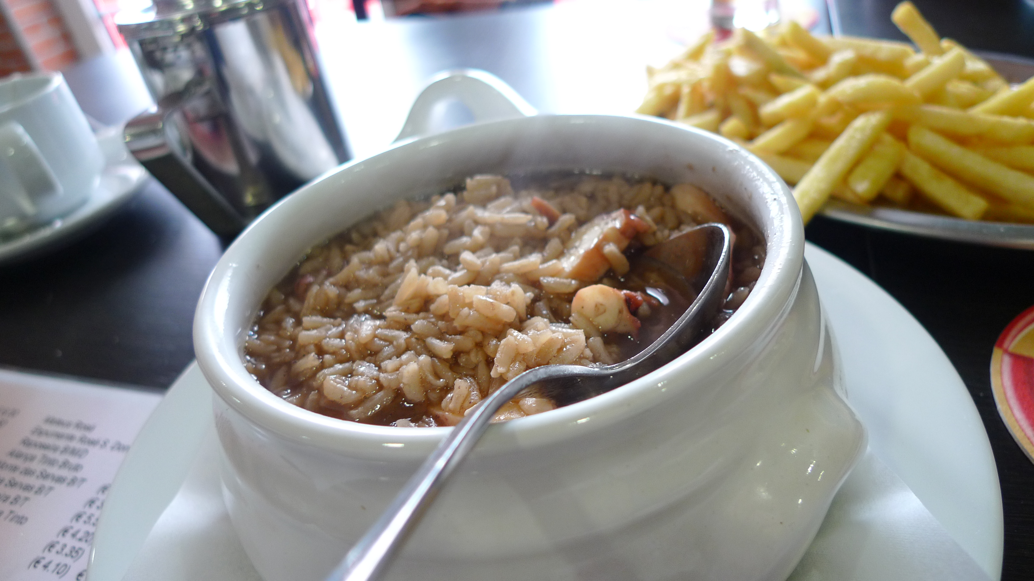 L1180577